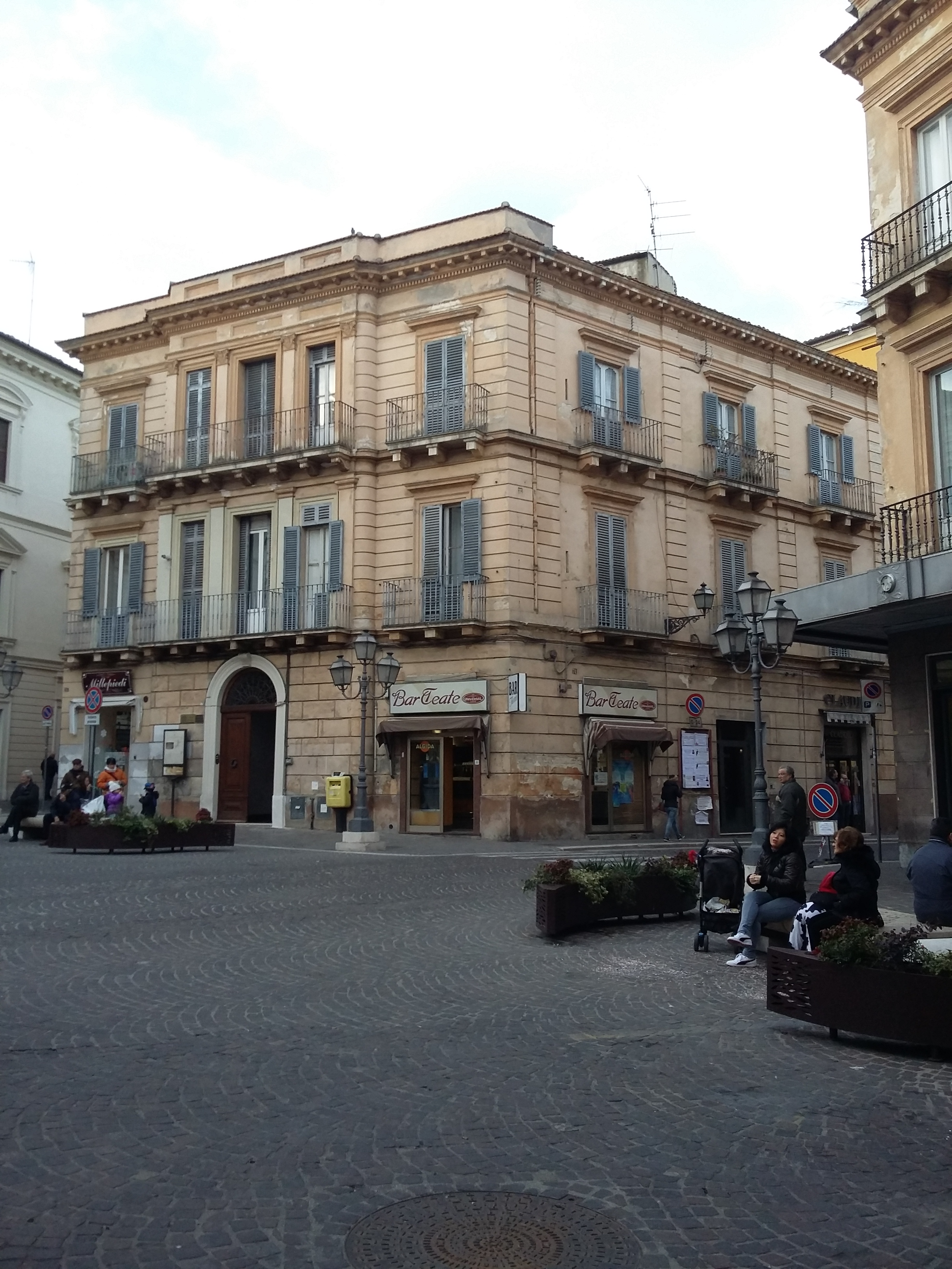 Un palazzo residenziale in Piazza Valignani (Chieti).